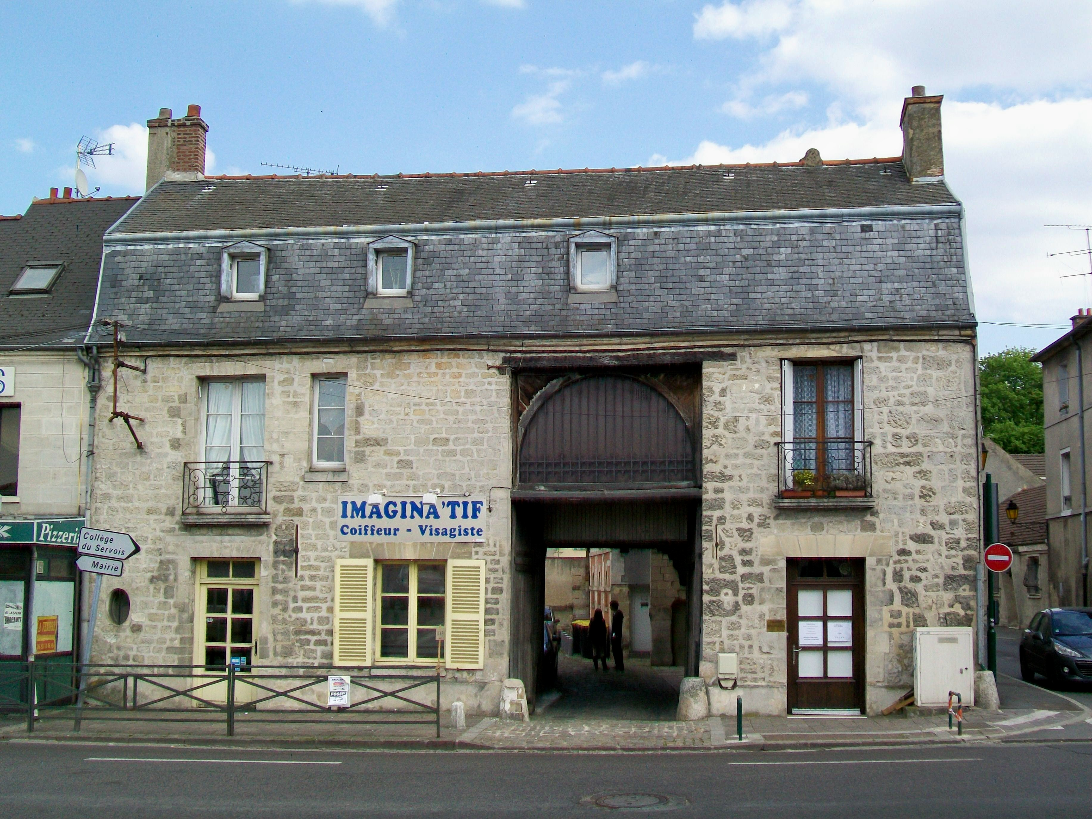 Au XVIIIe siècle, après l'amélioration de la grande route de Paris à Senlis (future RN 17), plusieurs hôtelleries se sont établies à La Chapelle, dont celle-ci reste près de son état d'origine : L'hôtel du Mouton, en même temps relais de poste. Dans la cour, une façade à colombages et une ancienne galerie extérieure restent encore visibles.